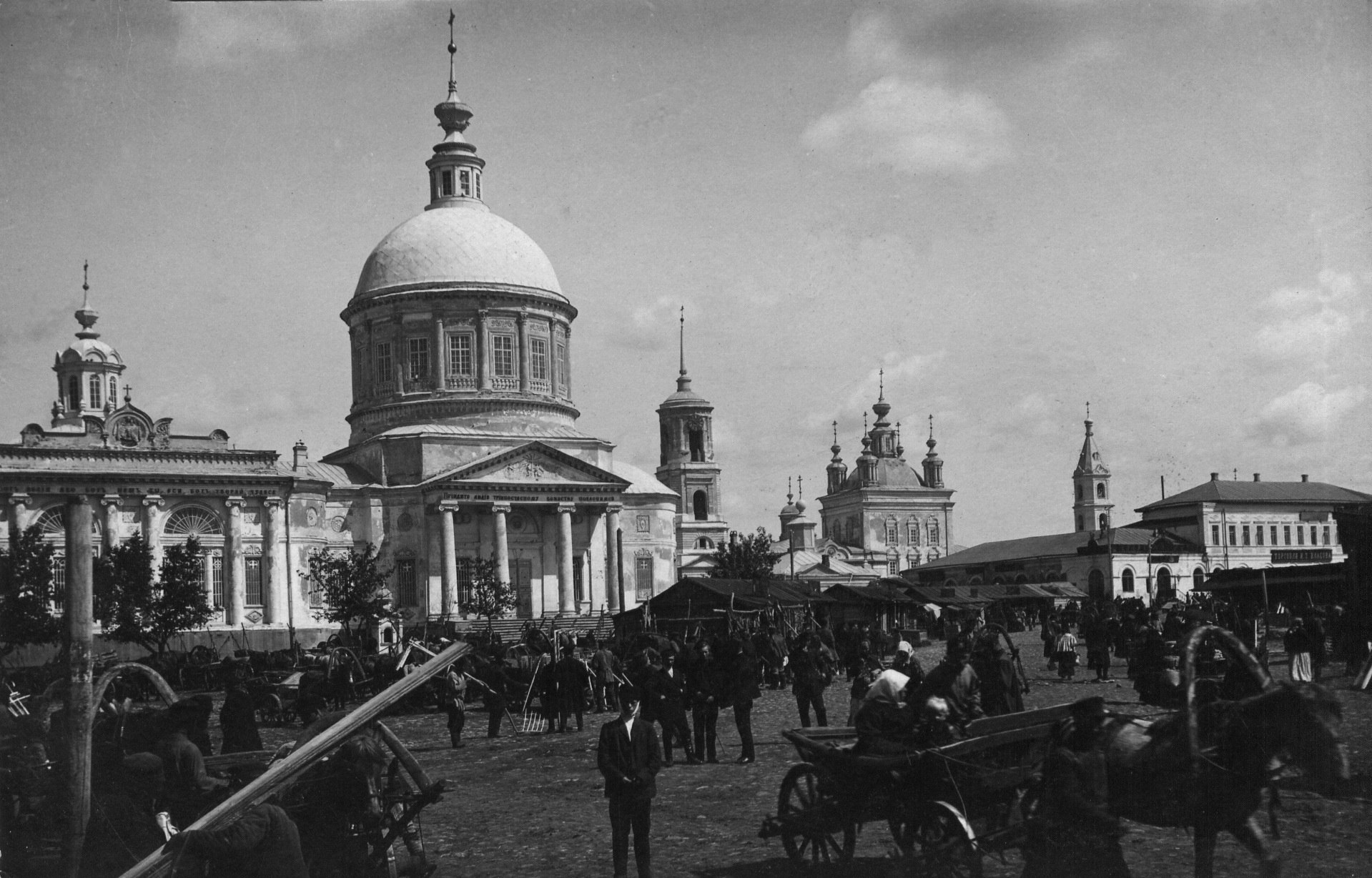 Троицкий собор на Красной Площади г.Скопина Рязанской области (сегодня на этом месте стадион "Труд" и памятник В.И.Ленину)